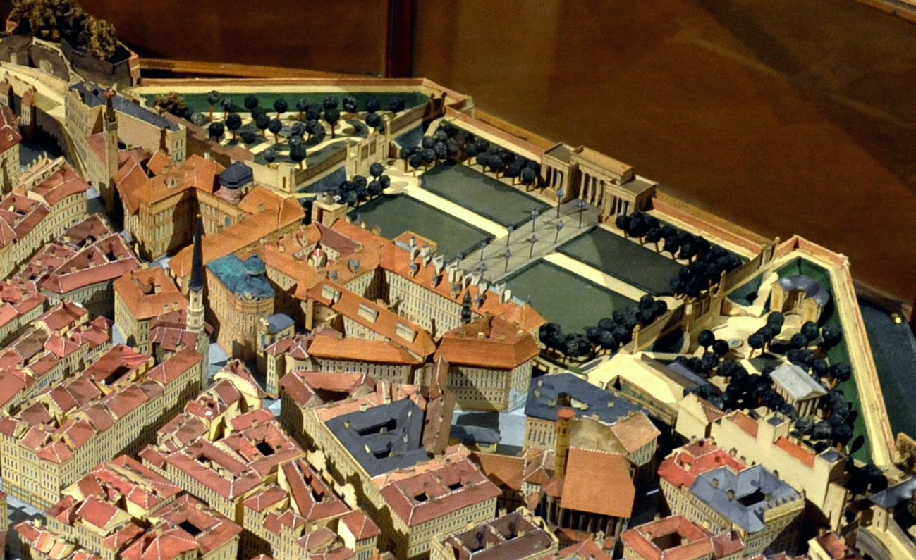 Modell der Stadt Wien um 1845, ausgestellt in der Sammlung Alter Musikinstrumente (des Kunsthistorischen Museums) in der Neuen Burg. Leihgabe von Helmut Czakler, Wien. Hofburg, dahinter Burggarten (links), Heldenplatz mit Äußerem Burgtor (Mitte) und Volksgarten (rechts); rechts vorne im Bild die Minoritenkirche